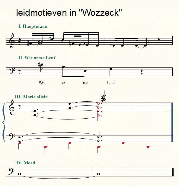 Leidmotieven in Wozzeck